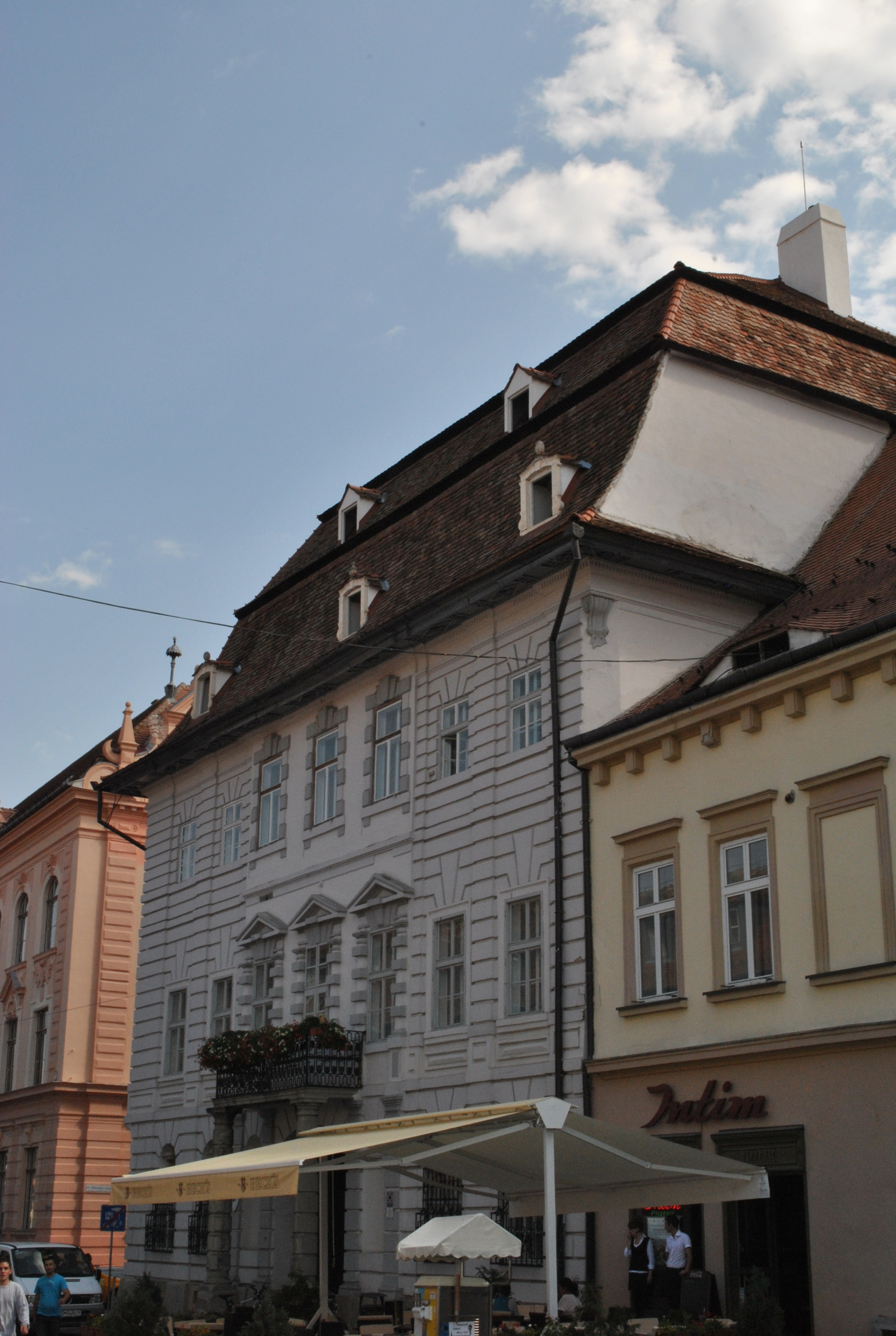 Casa Filek, azi sediul Consistoriului Superior al Bisericii Evanghelice C. A. din România, 1802